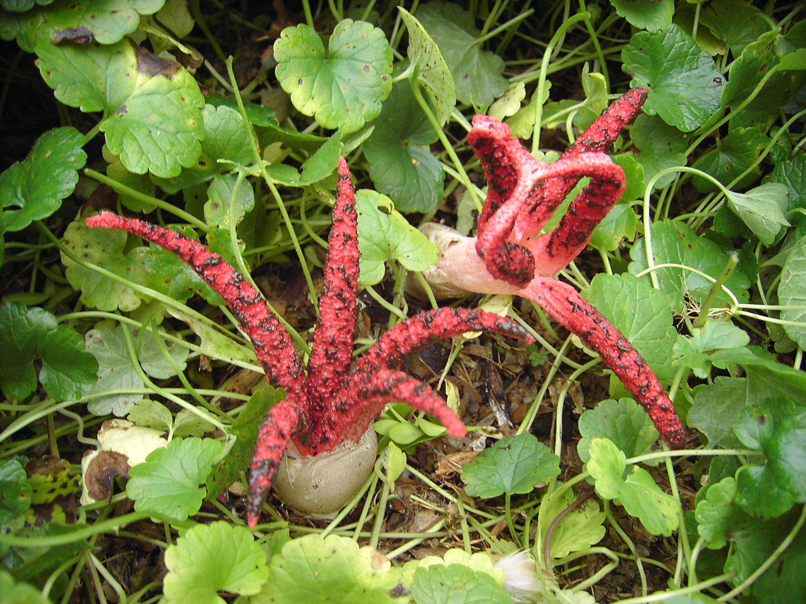 Inktviszwam gespot in Kalmthout (België).